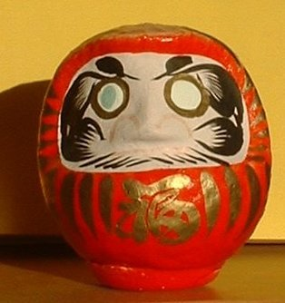 Daruma doll shaped like a Okiagari-koboshi